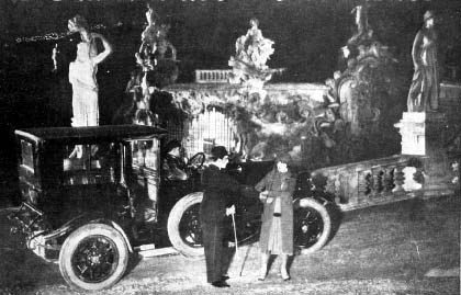 Fotogramma del film muto italiano Il carnevale di Venezia, regia di Mario Almirante, produz SASP Pittaluga, Torino, 1928